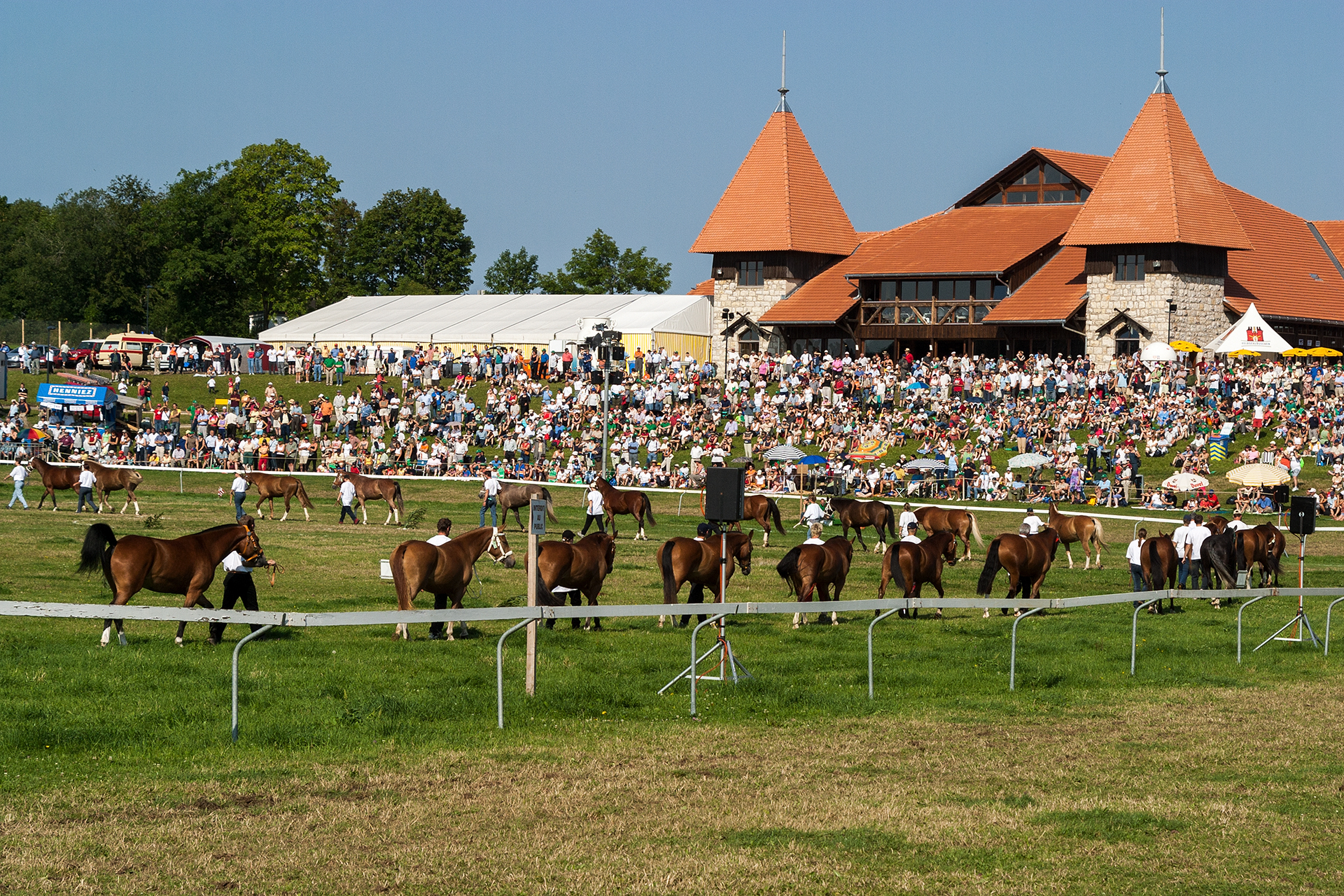 Prämierte Freiberger (Schweizer Pferderasse) am Marché Comcours in Saignelégier (JU)